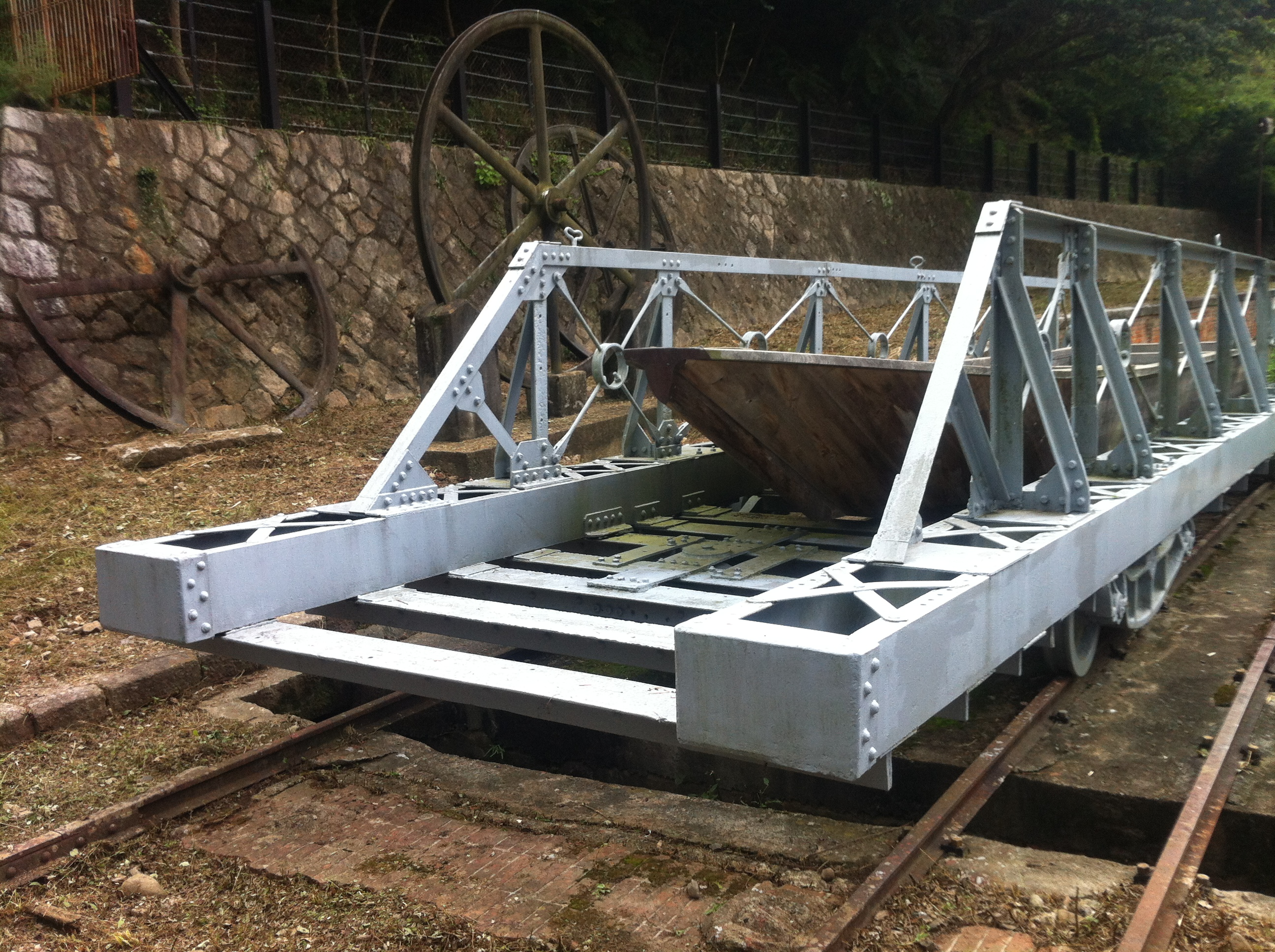 琵琶湖疏水のインクライン